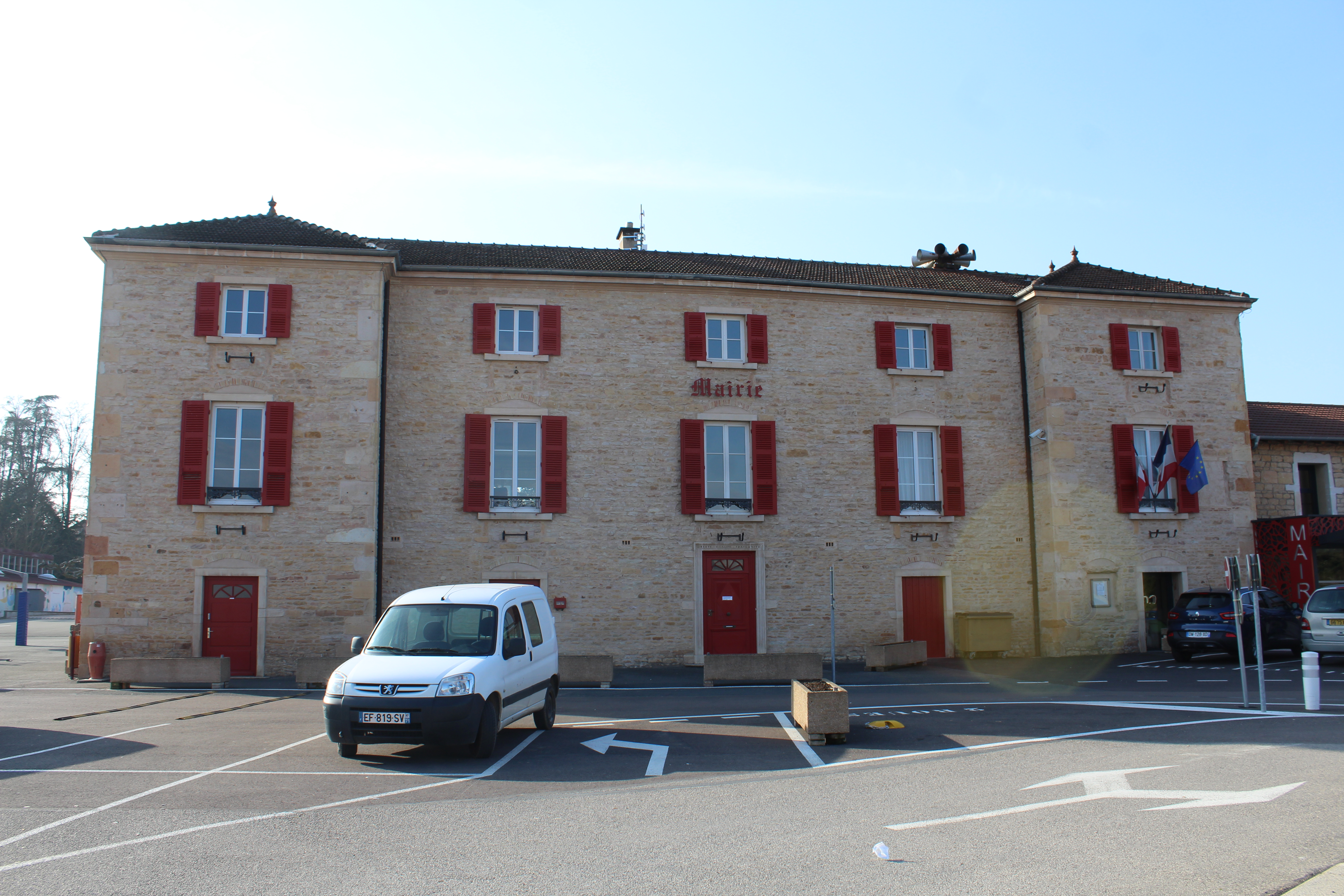 Mairie de Crêches-sur-Saône.